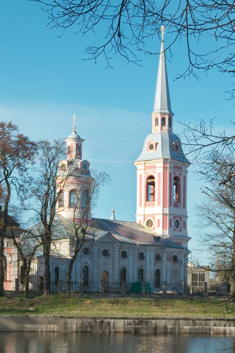 Благовещенский собор: Красная площадь, Шлиссельбург, Кировский район, Ленинградская область